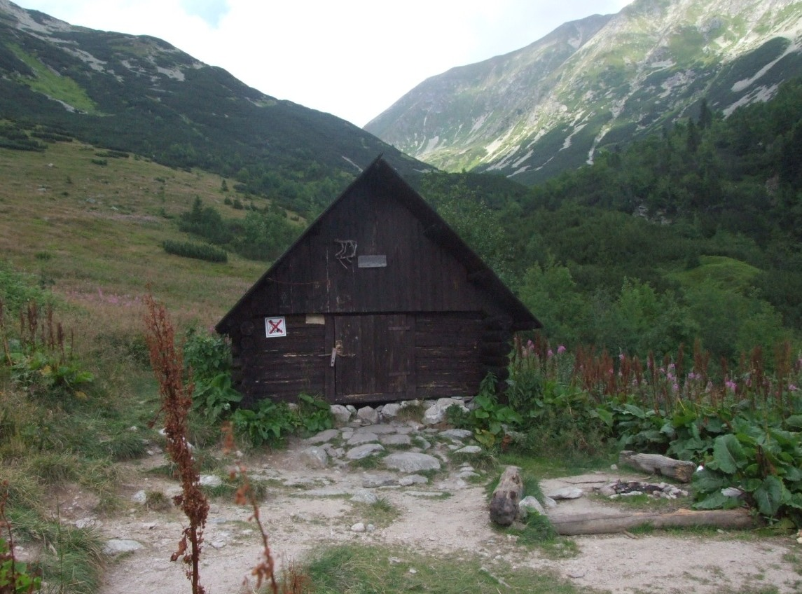 Szałas na Klinie u zbiegu Doliny Raczkowej i Gaborowej(Tatry Zachodnie)